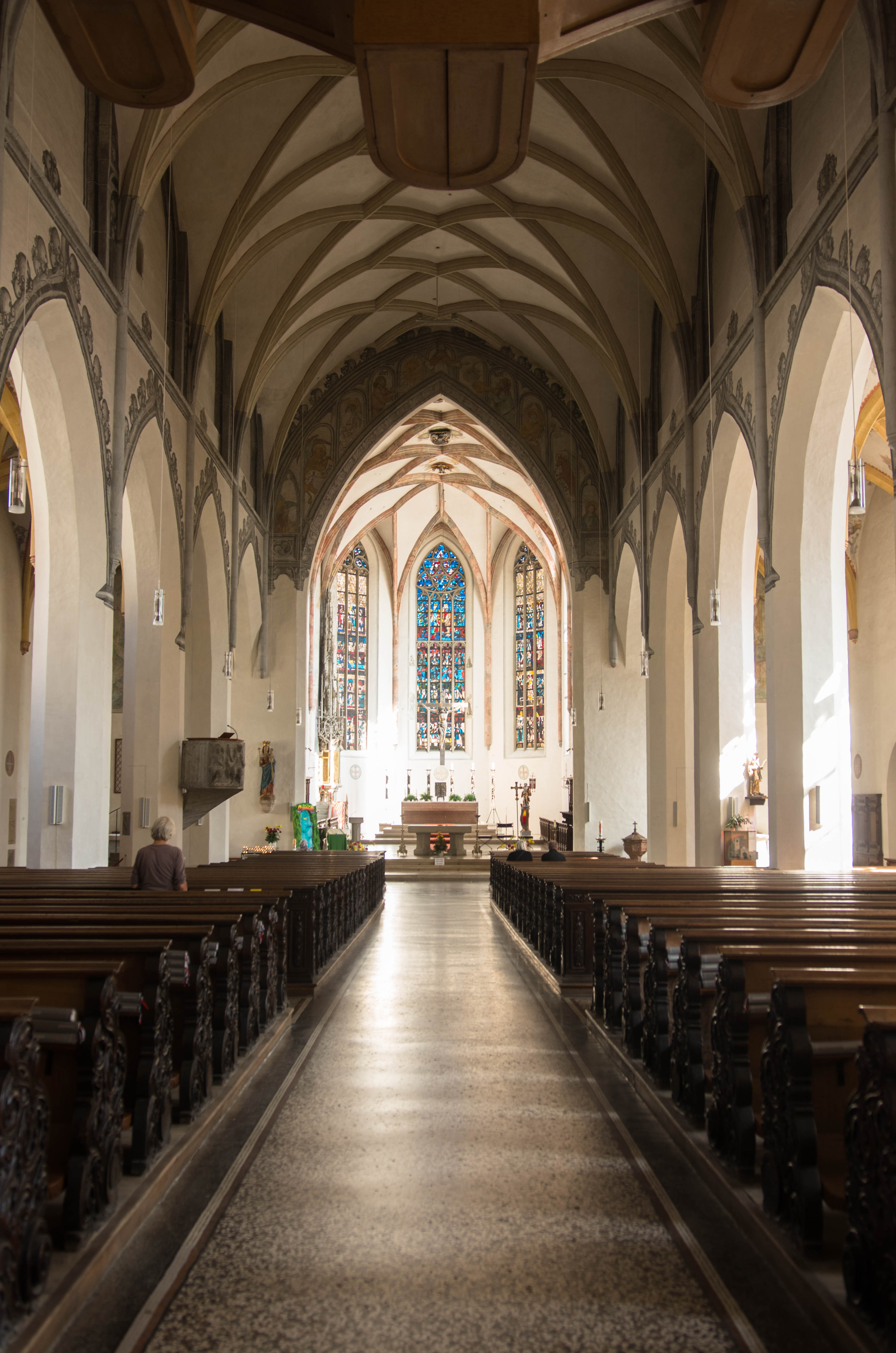 Donauwörth, Reichsstraße 37, Stadtpfarrkirche; hier: Blick zum Ostchor, Standort unterhalb der OrgelemporeThis is a photograph of an architectural monument.